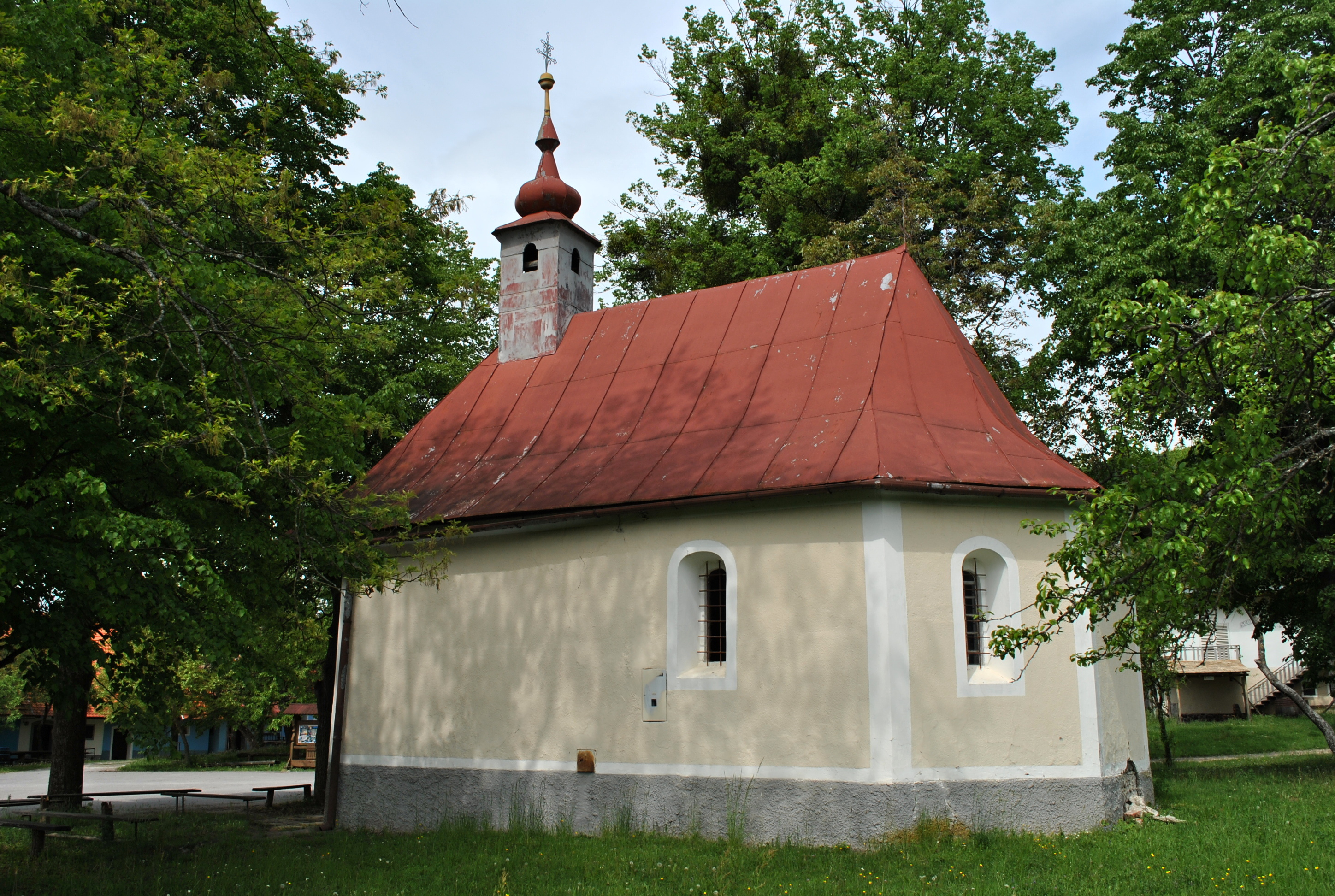 Sebechleby - časť Stará Hora - kaplnka Sv. Urbana